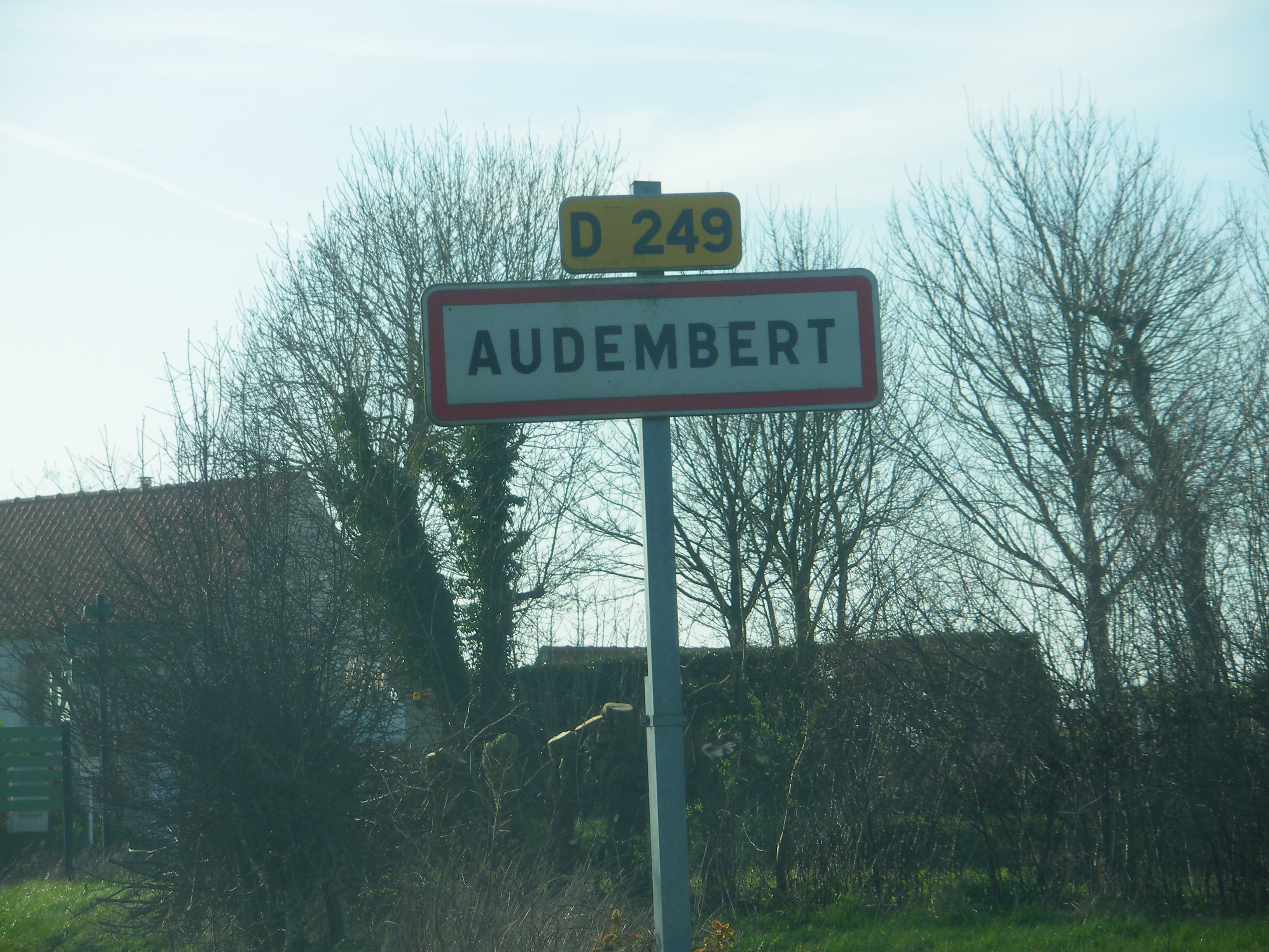 Panneau d'entrée de la commune d'Audembert.